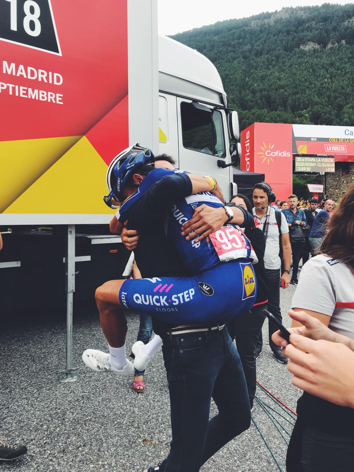 Toni Colom abraza a Enric Más en el final de etapa de la Vuelta a España 2018